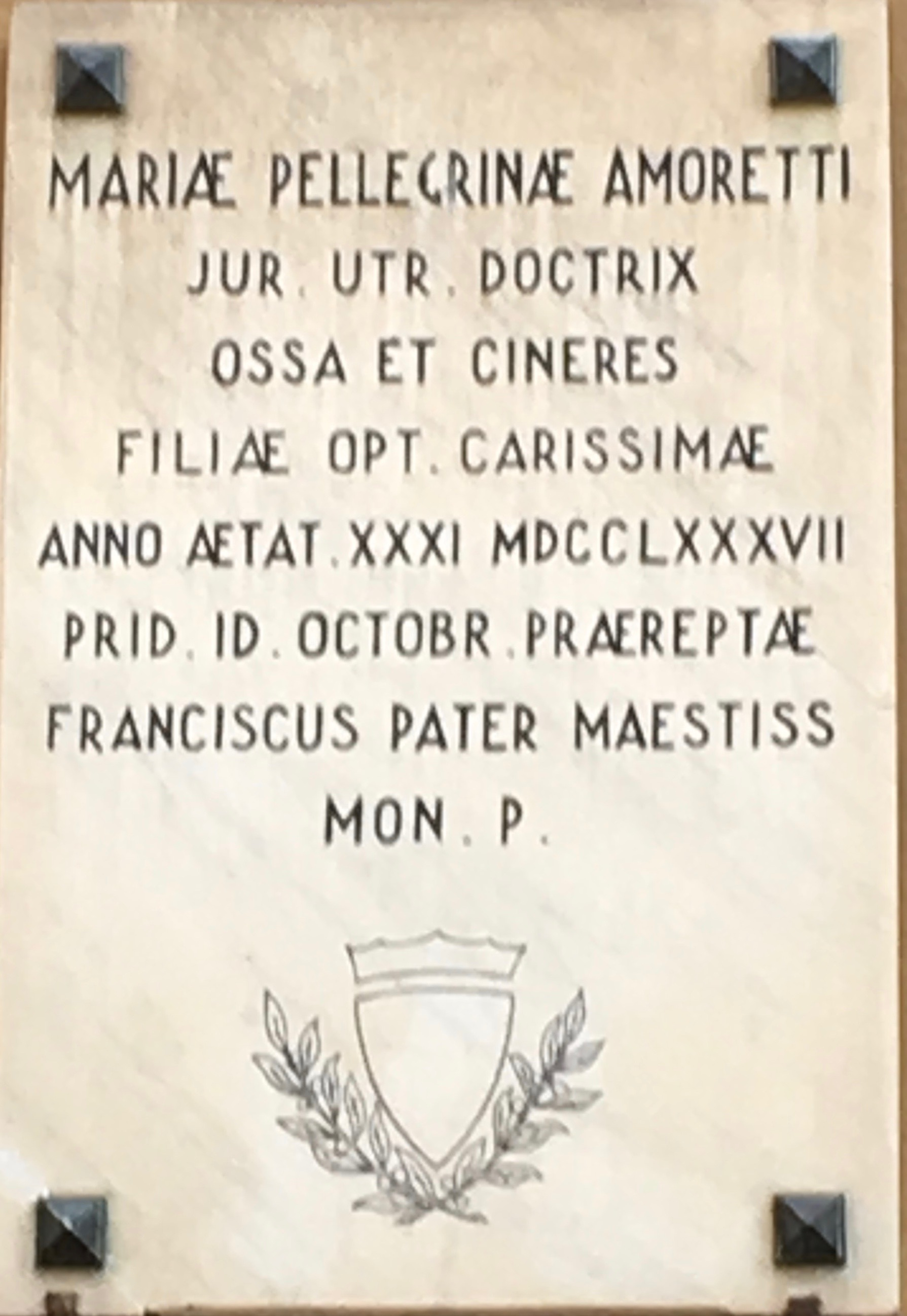 Foto di lapide murata all'esterno della Collegiata di San Giovanni Battista a Oneglia (imperia - Italia)